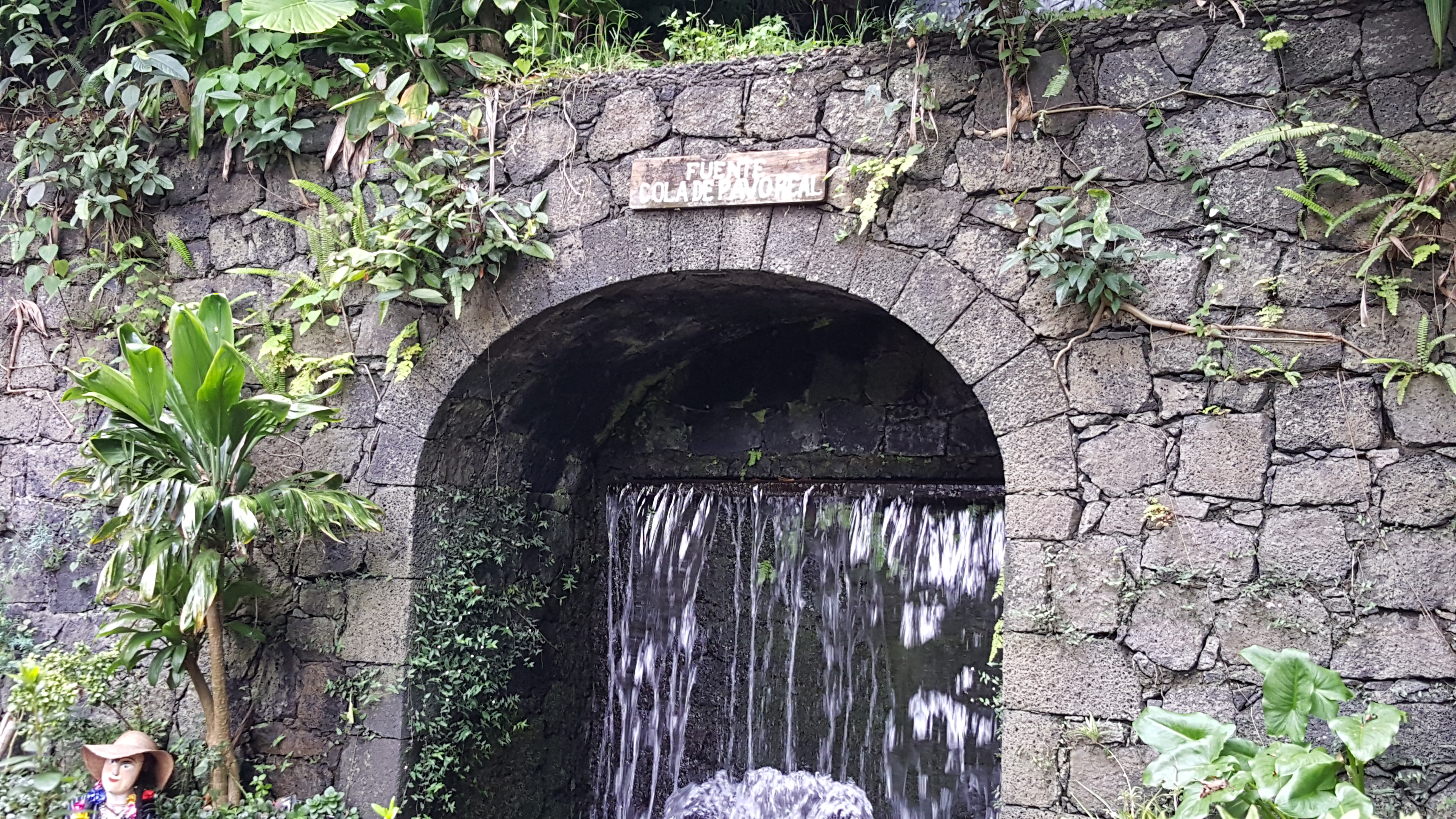 Fuente Cola Pavo Real Parque Nacional Cupatitzio